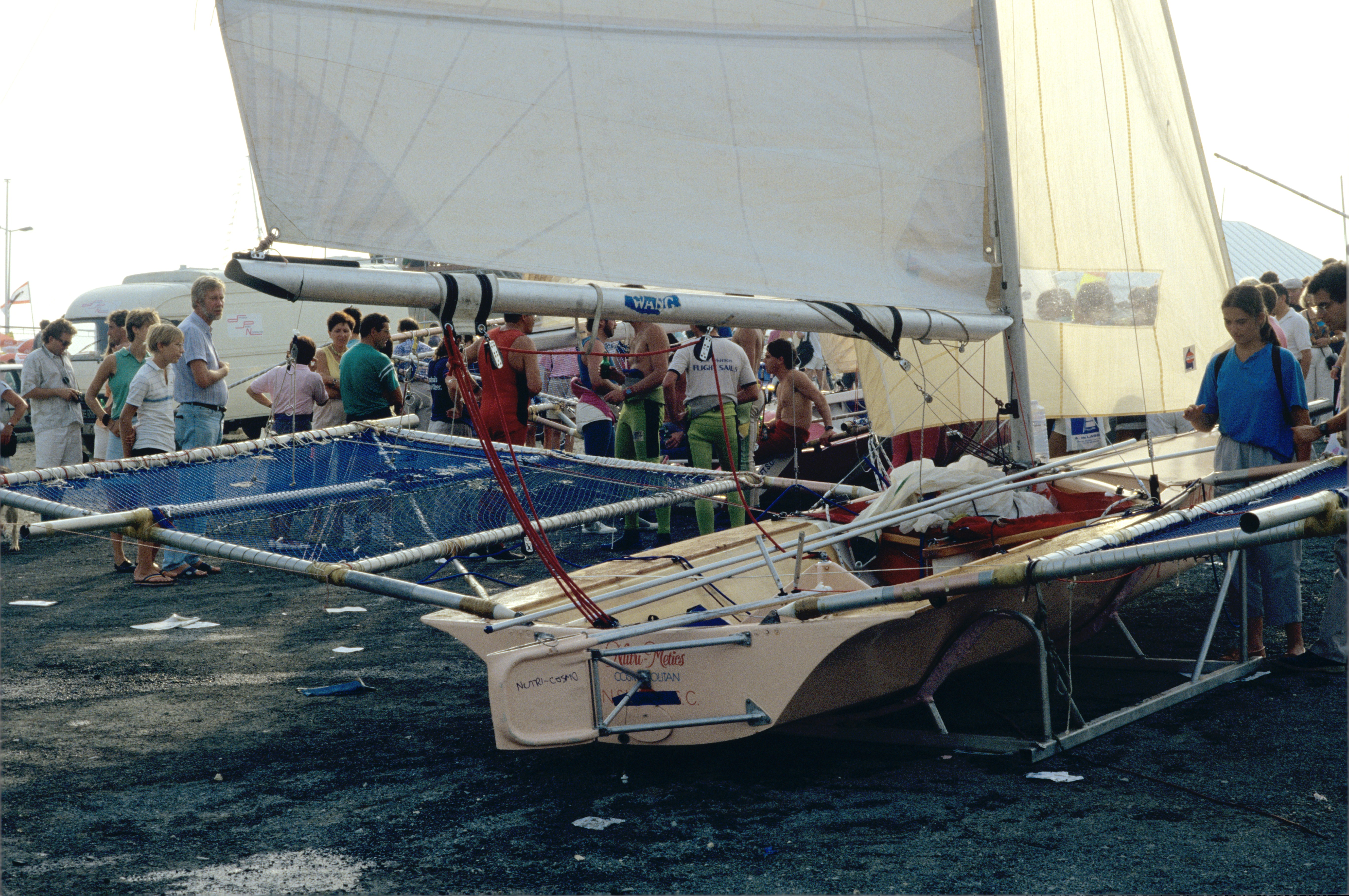 Après la fin de la course des dériveurs australiens de 18 pieds dans la baie de La Rochelle, les équipes participantes reviennent à la cale Marillac, dans le Port de Plaisance des Minimes, et sortent leur bateau de l’ eau. Salon Nautique International à Flot (« Grand Pavois ») de La Rochelle 1987. Quinzième édition du jeudi 17 au lundi 21 septembre. La Rochelle, Charente Maritime, France.